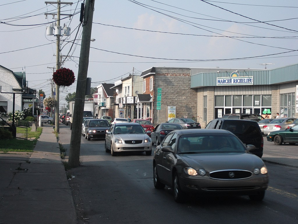 Vue sur la route 335, dans la municipalité de Saint-Lin-Laurentides (dans la région de Lanaudière), Québec, Canada.